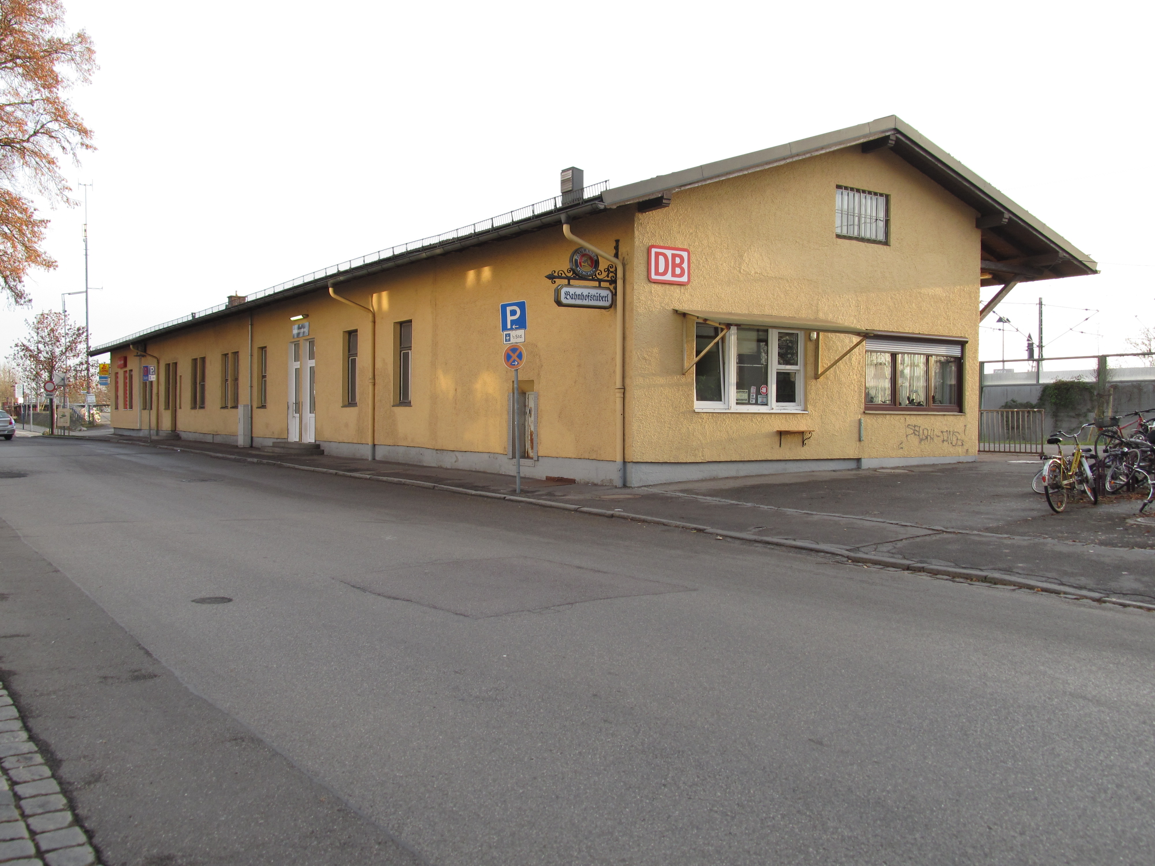 Bahnhofsgebäude von Mering von der Straßenseite